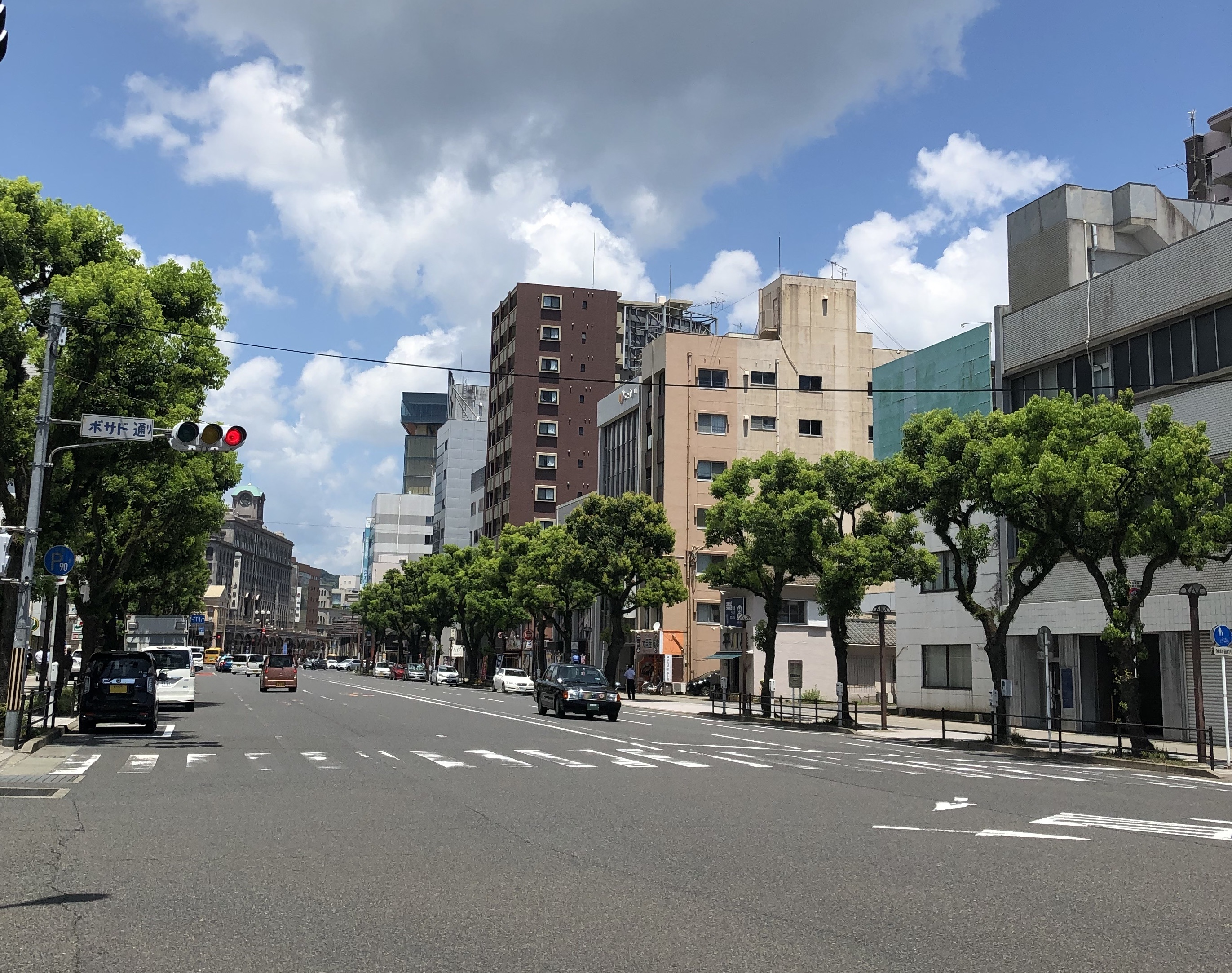 大黒町の中央を南北に通る大門口通り。